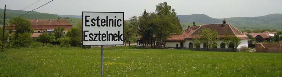 Esztelnek látképe, Székelyföld (háttérben a ferences zárda és az iskola)